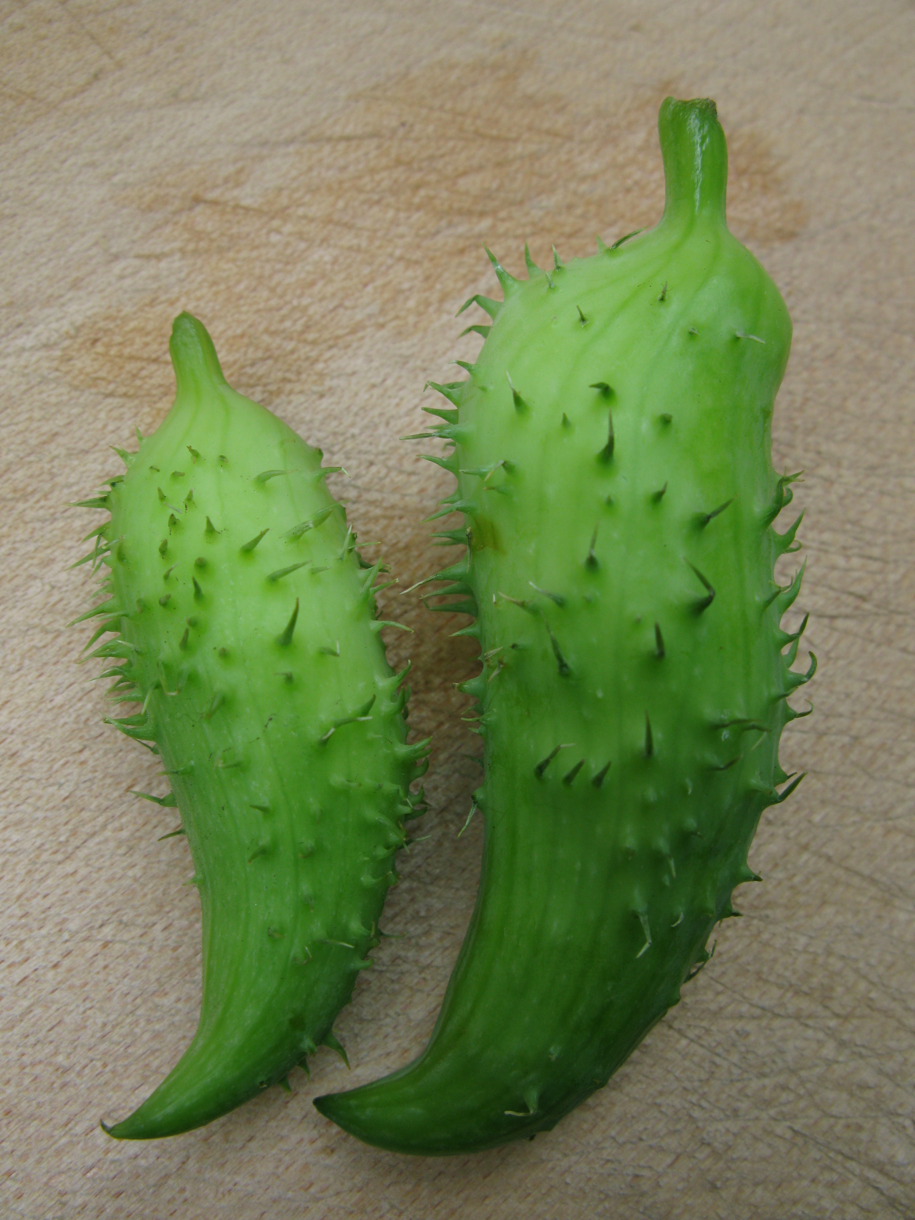 Inka-Gurke